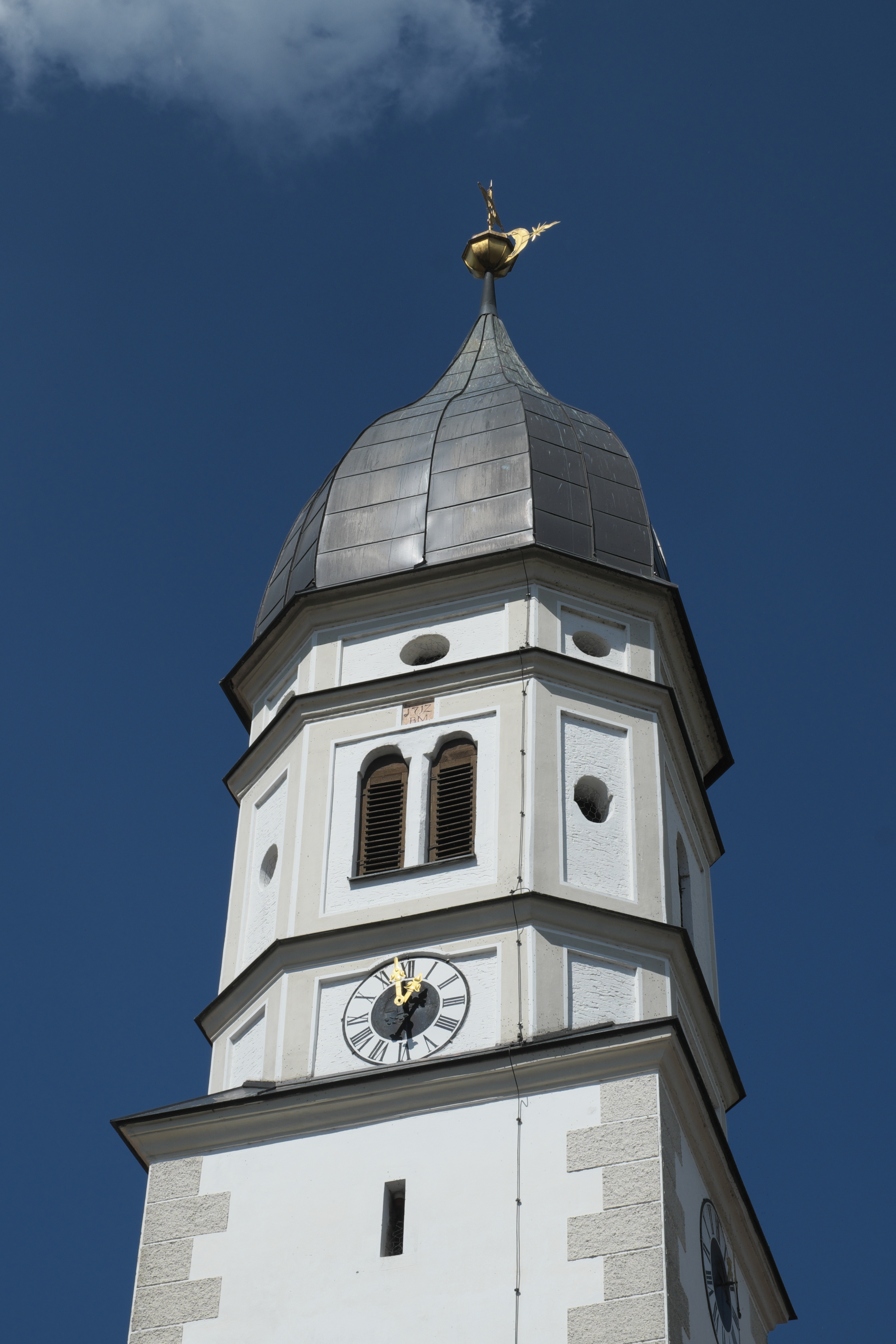 Katholische Pfarrkirche St. Mauritius in Oberhausen im Landkreis Weilheim-Schongau (Bayern/Deutschland), Turm